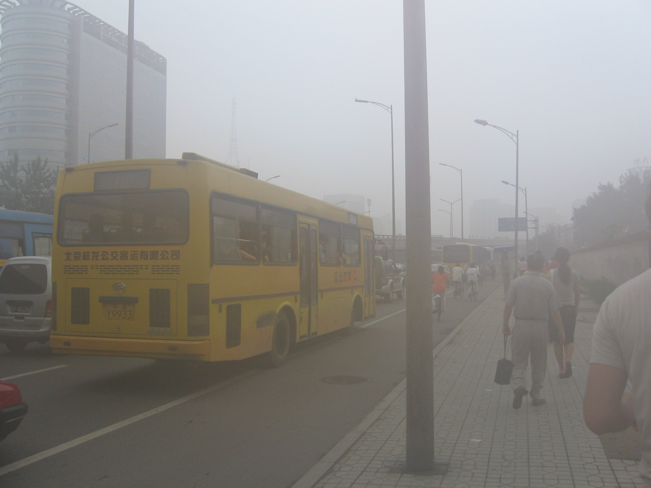 Смог в Пекине при большой влажности и температуре